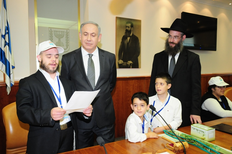 ראש הממשלה מקבל ארבעת המינים מילדי עמותת יד לילד המיוחד